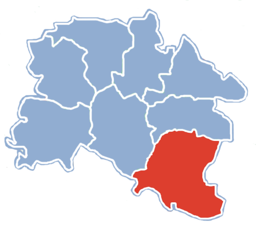 Położenie gminy Nowa Brzeźnica na mapie powiatu pajęczańskiego.